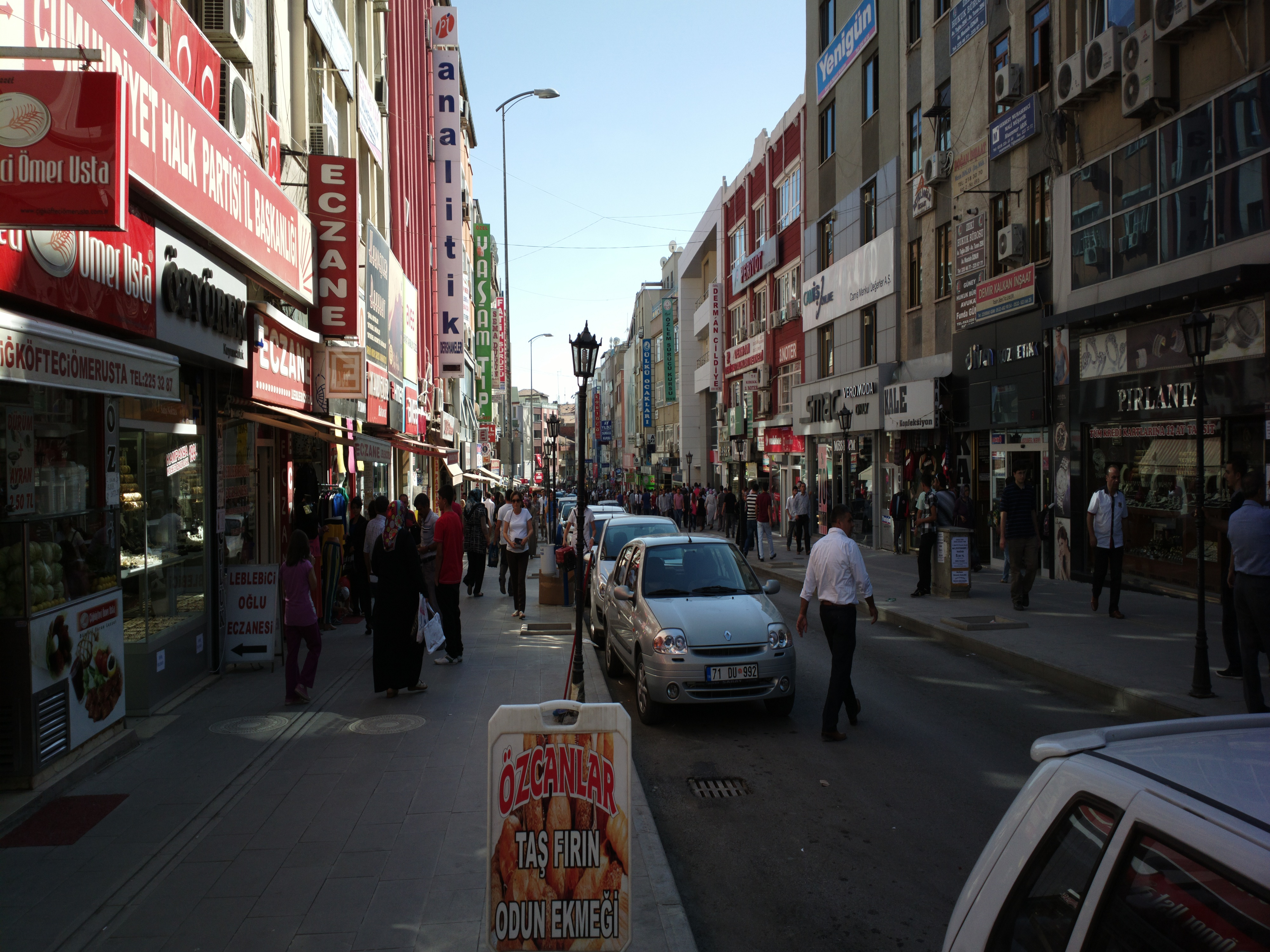 Zafer Caddesinden Bir Görünüm